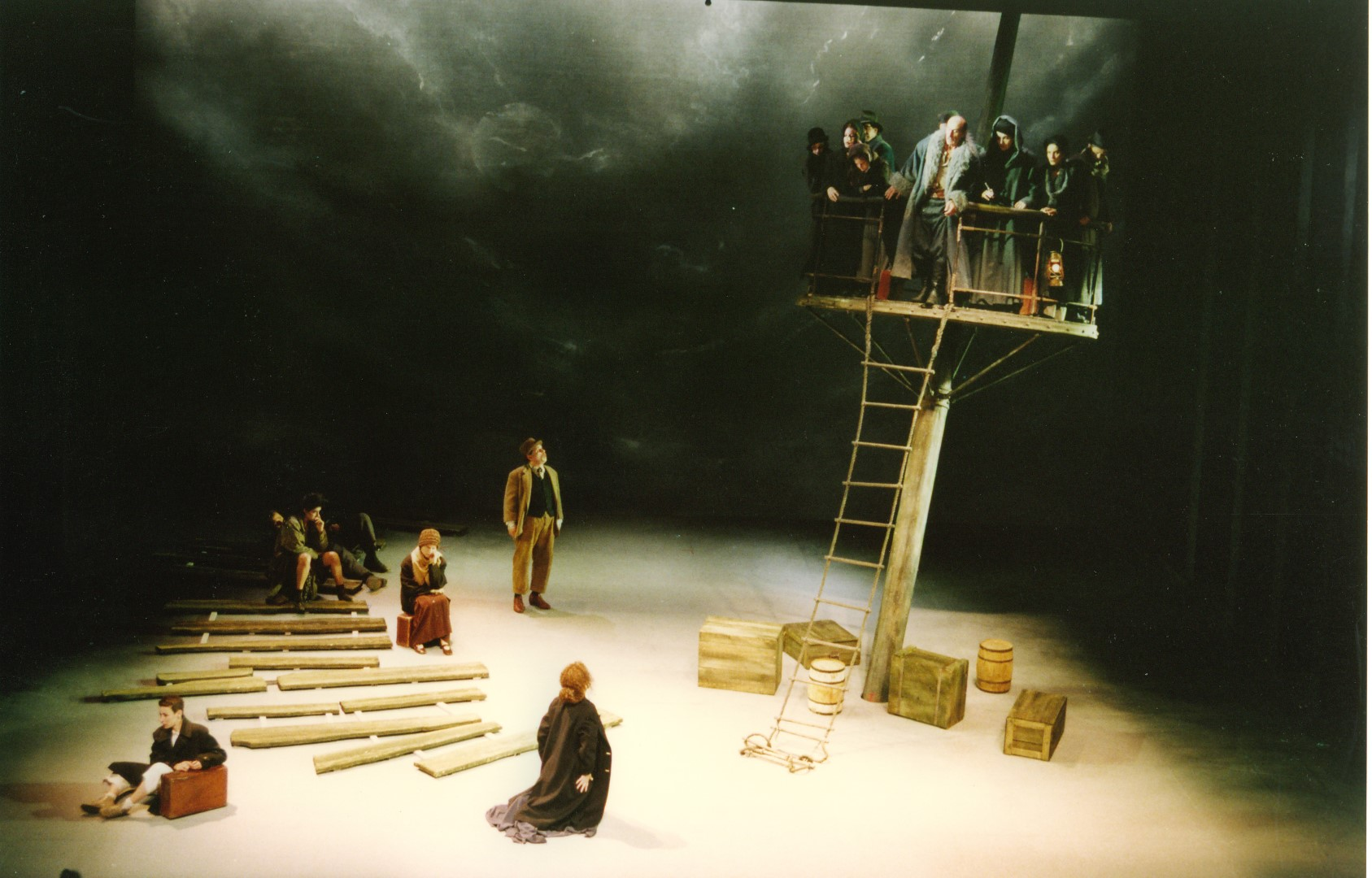 הילד חולם, במאי: חנוך לוין, תפאורה ותלבושות: רוני תורן, תאורה: בן ציון מוניץ. תיאטרון הבימה, 1994. צילום: פסי גירש